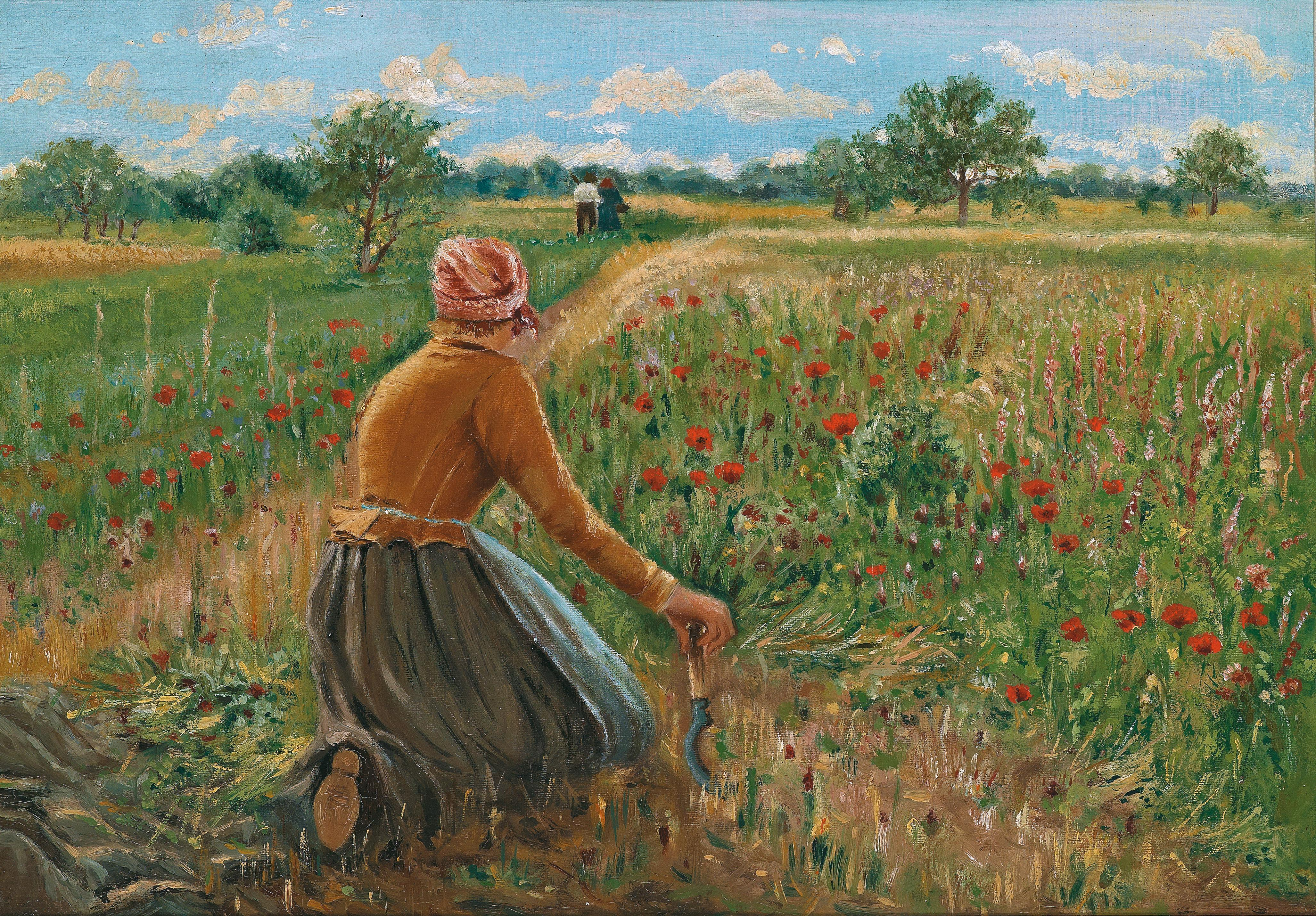 Knieende Bäuerin mit Sicheltitle QS:P1476,de:"Knieende Bäuerin mit Sichel" label QS:Lde,"Knieende Bäuerin mit Sichel"